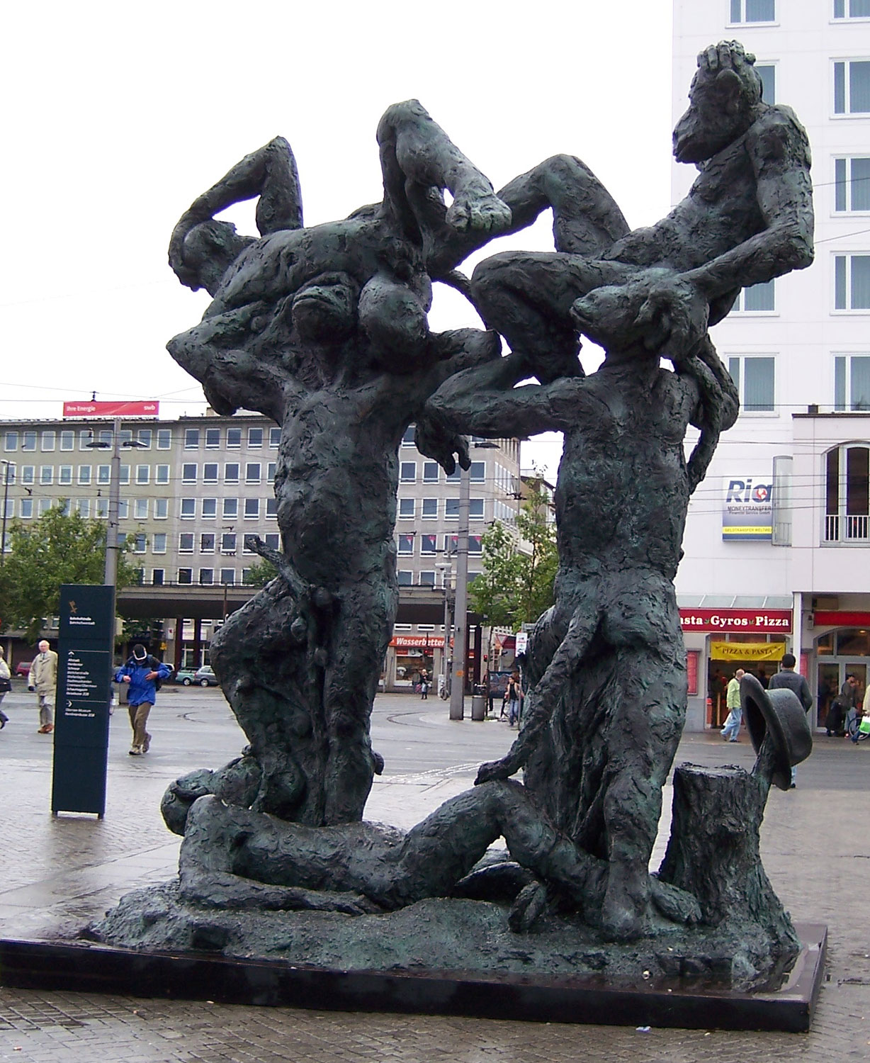 Bronzestandbild "Affentor I" (Höhe 5 m) von Jörg Immendorff am Hauptbahnhof in Bremen. Aufstellung anlässlich der Ausstellung Jörg Immendorff in der Weserburg I (Kunst im Öffentlichen Raum - ein Bremer Programm). Die Leihgabe einer privaten Sammlerin wurde Anfang März 2012 zum Museum der Moderne nach Salzburg verbracht. k: kunst im öffentlichen raum bremen